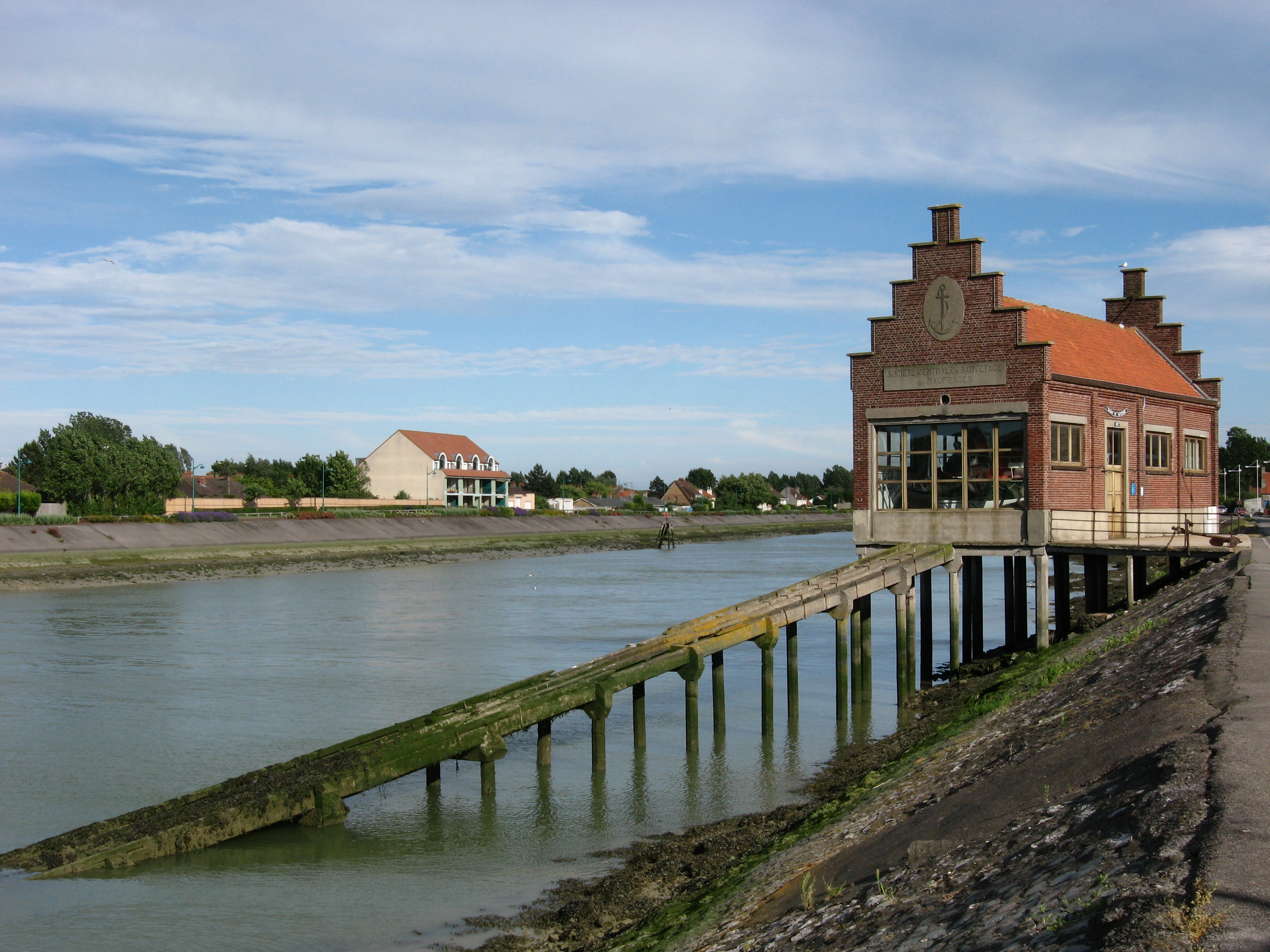 Ancien abri du canot de sauvetage de Grand-Fort-Philippe, devenue un musée.